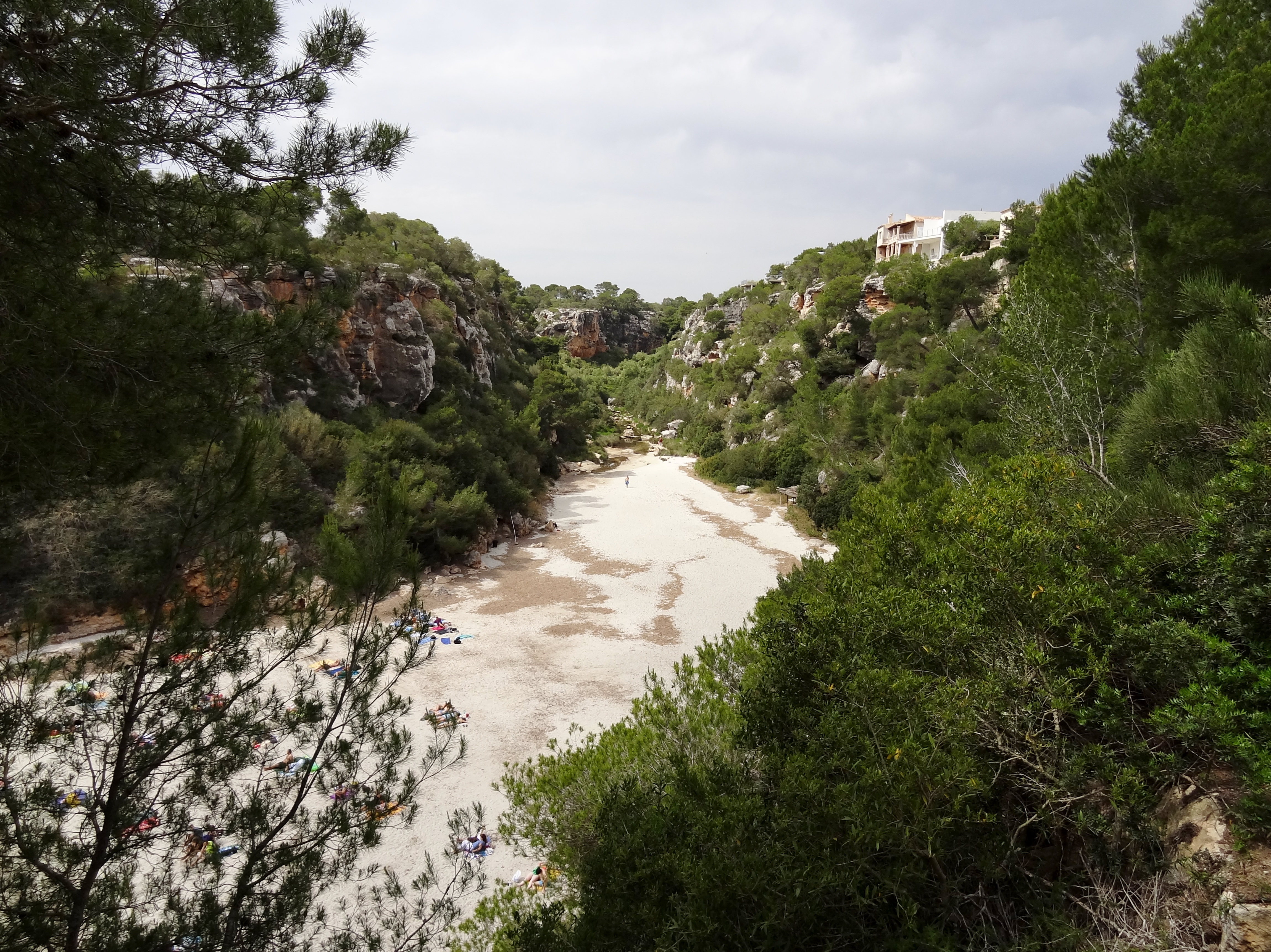 Strand der Cala Pi, Gemeinde Llucmajor, Mallorca, Spanien